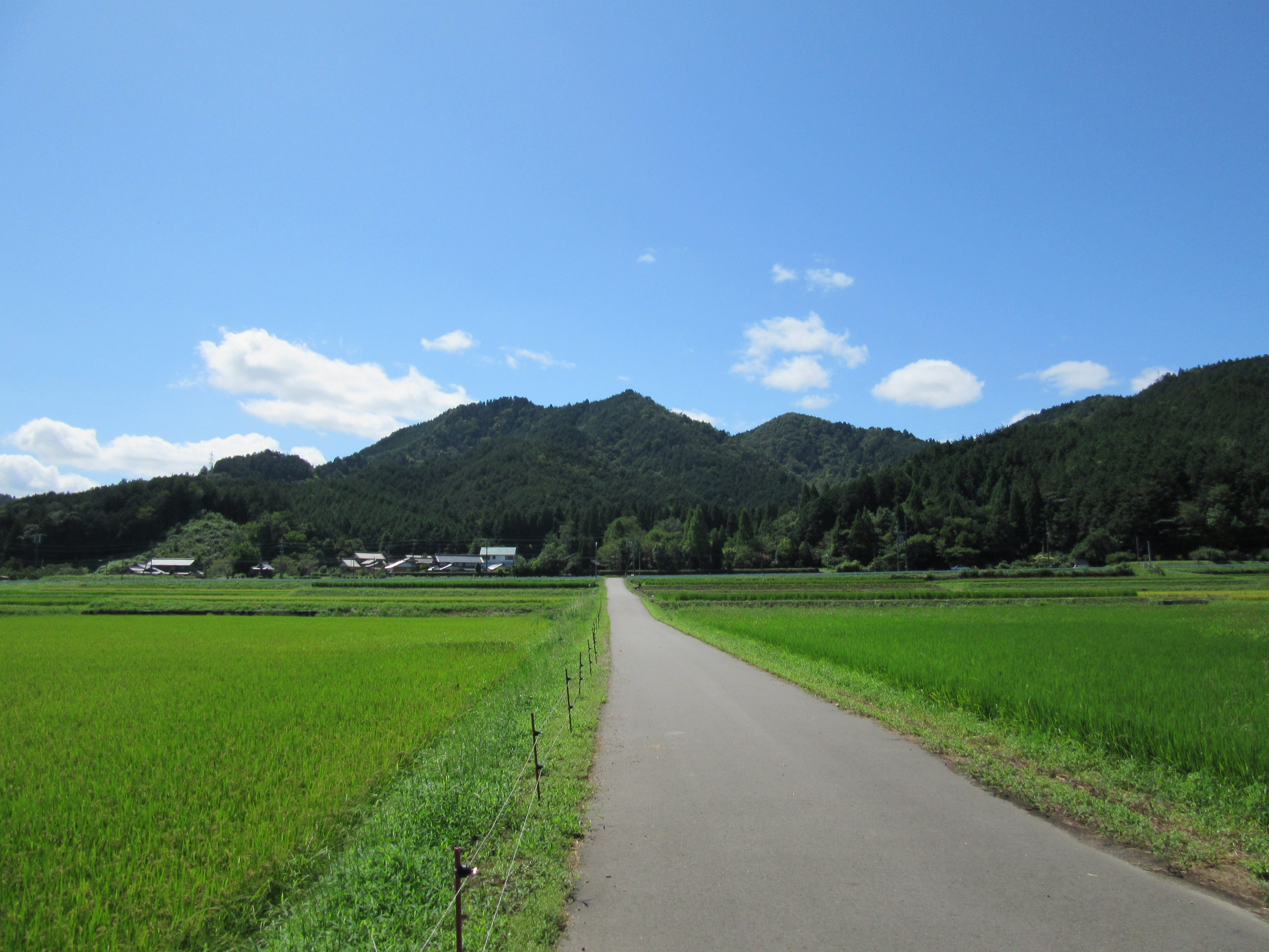 岐阜市佐野。縣神社より集落方面を眺める